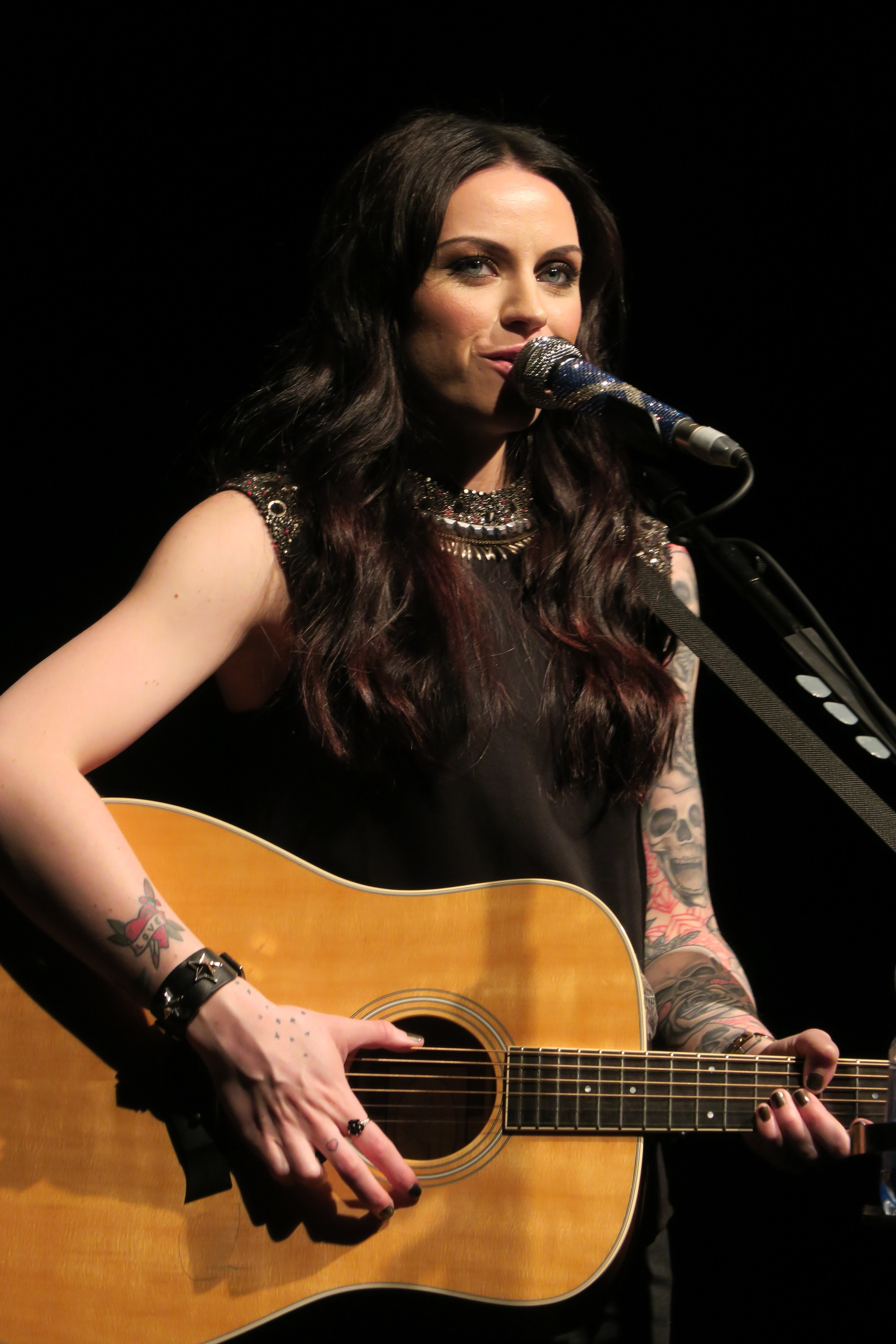 Amy Macdonald, Konzert "Under Stars", 2017-03-15, TonHalle München